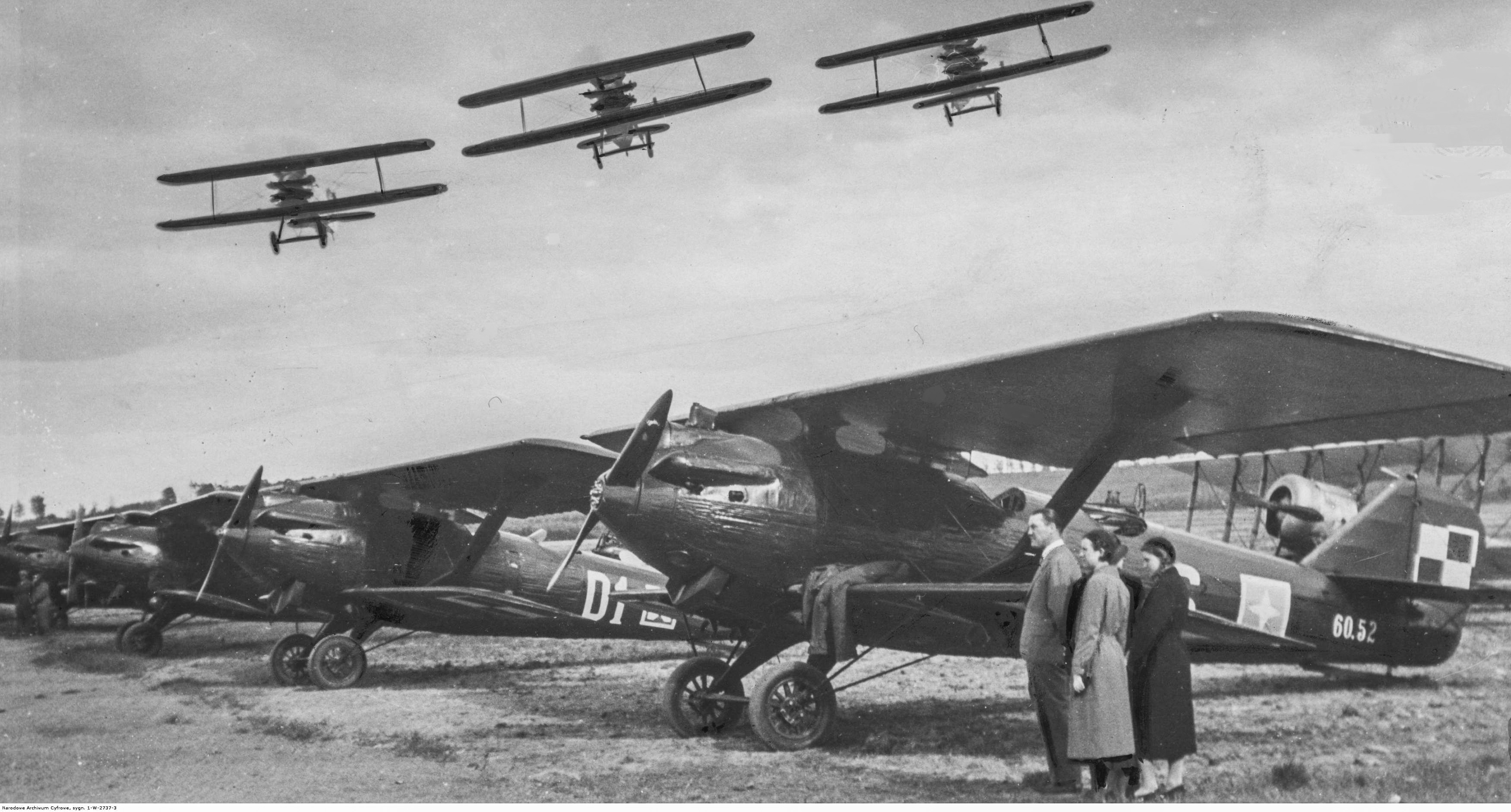 Tydzień Ligi Obrony Powietrznej i Przeciwgazowej w Katowicach. Samoloty Breguet XIX na lotnisku, nad którym akrobacje wykonują trzy myśliwce PWS-A (tzw. "trójka Bajana"). Koncern Ilustrowany Kurier Codzienny - Archiwum Ilustracji. Sygnatura: 1-W-2737-3